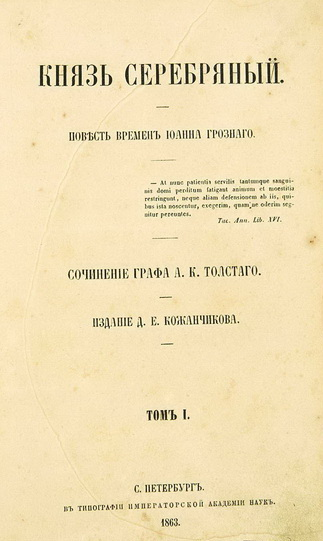 Первое издание романа "Князь Серебряный"